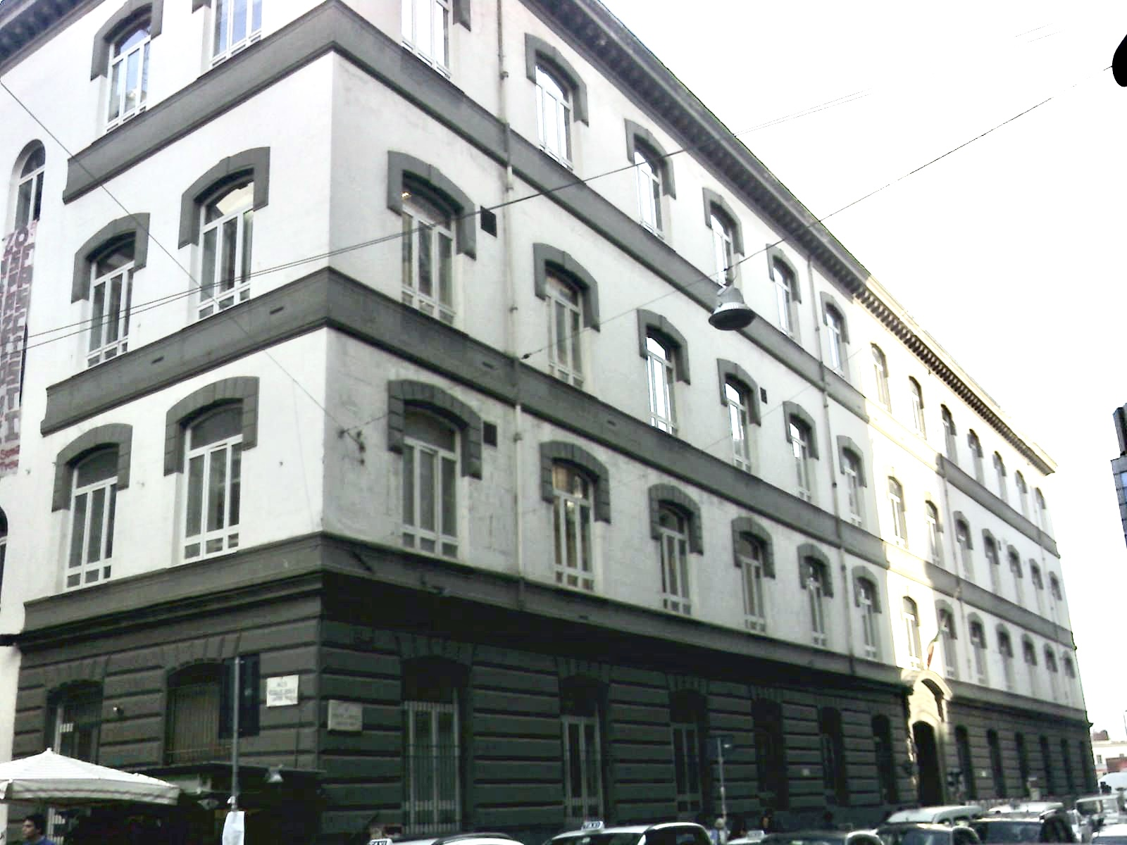 Palazzo dell' università di Lettere di Napoli (Federico II)